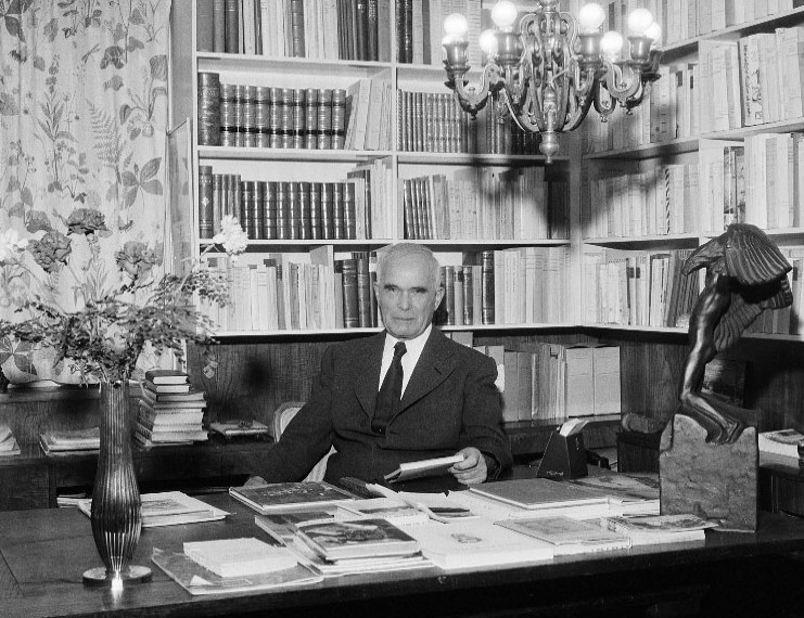 Olle Engkvist, byggmästare, i sitt hem i Gröndal